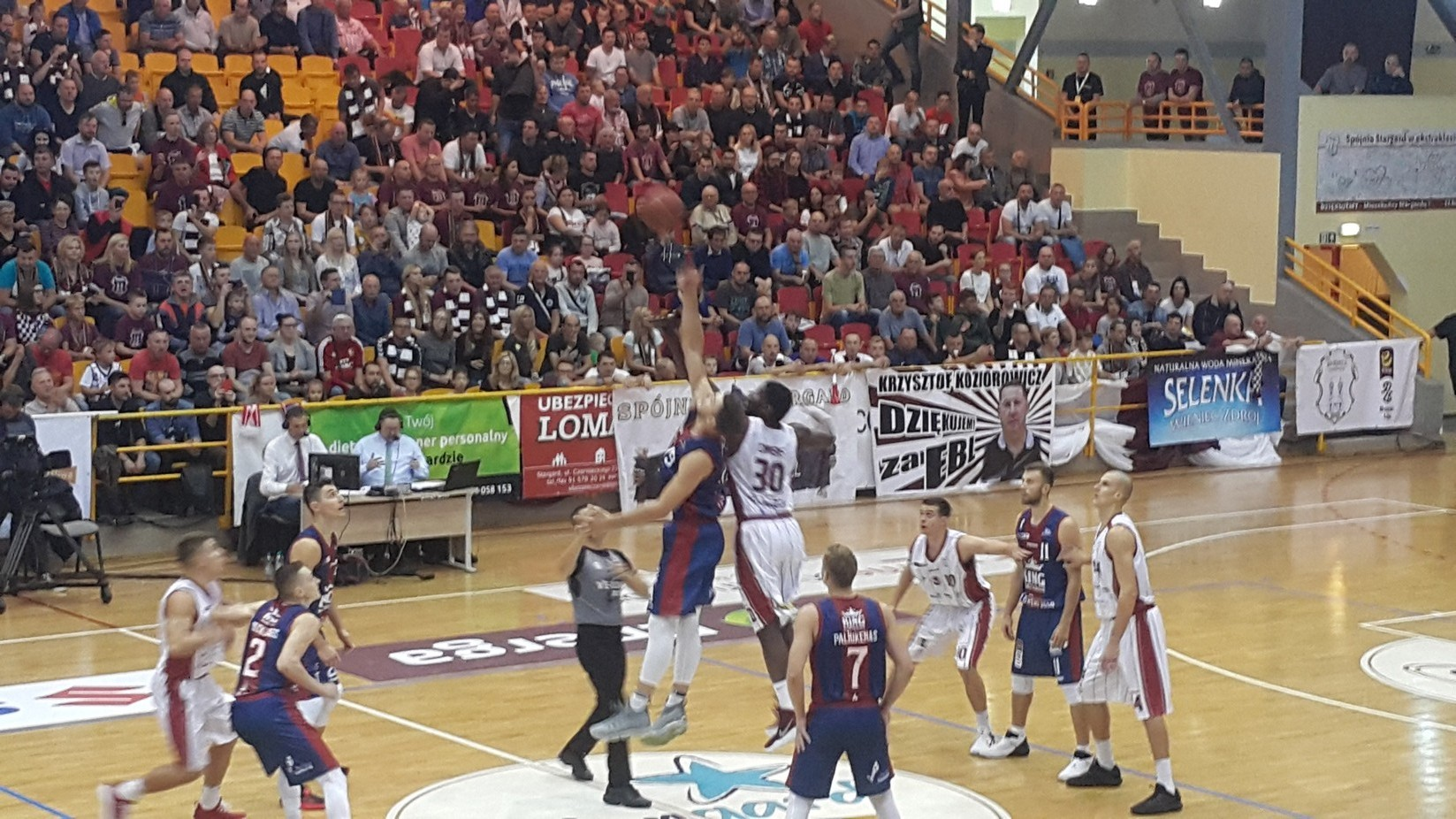 Stargard, 06.10.2018r. Mecz Spójnia - King.